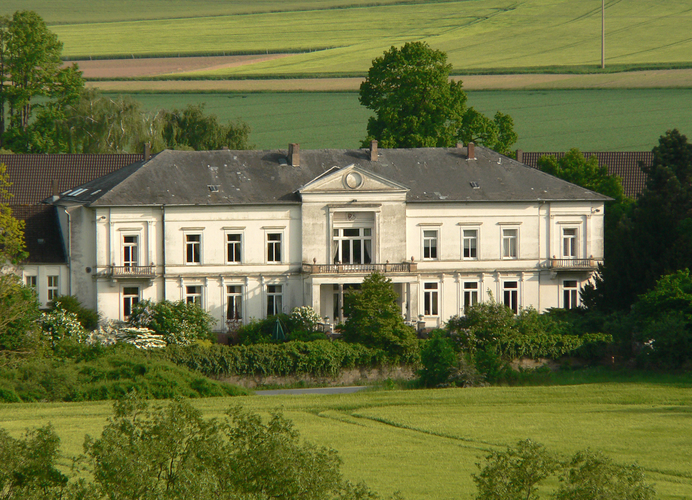 Rittergut Ohr